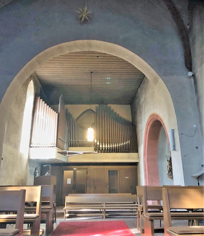 Wallfahrtskirche Maria vom rauhen Wind in Kälberau